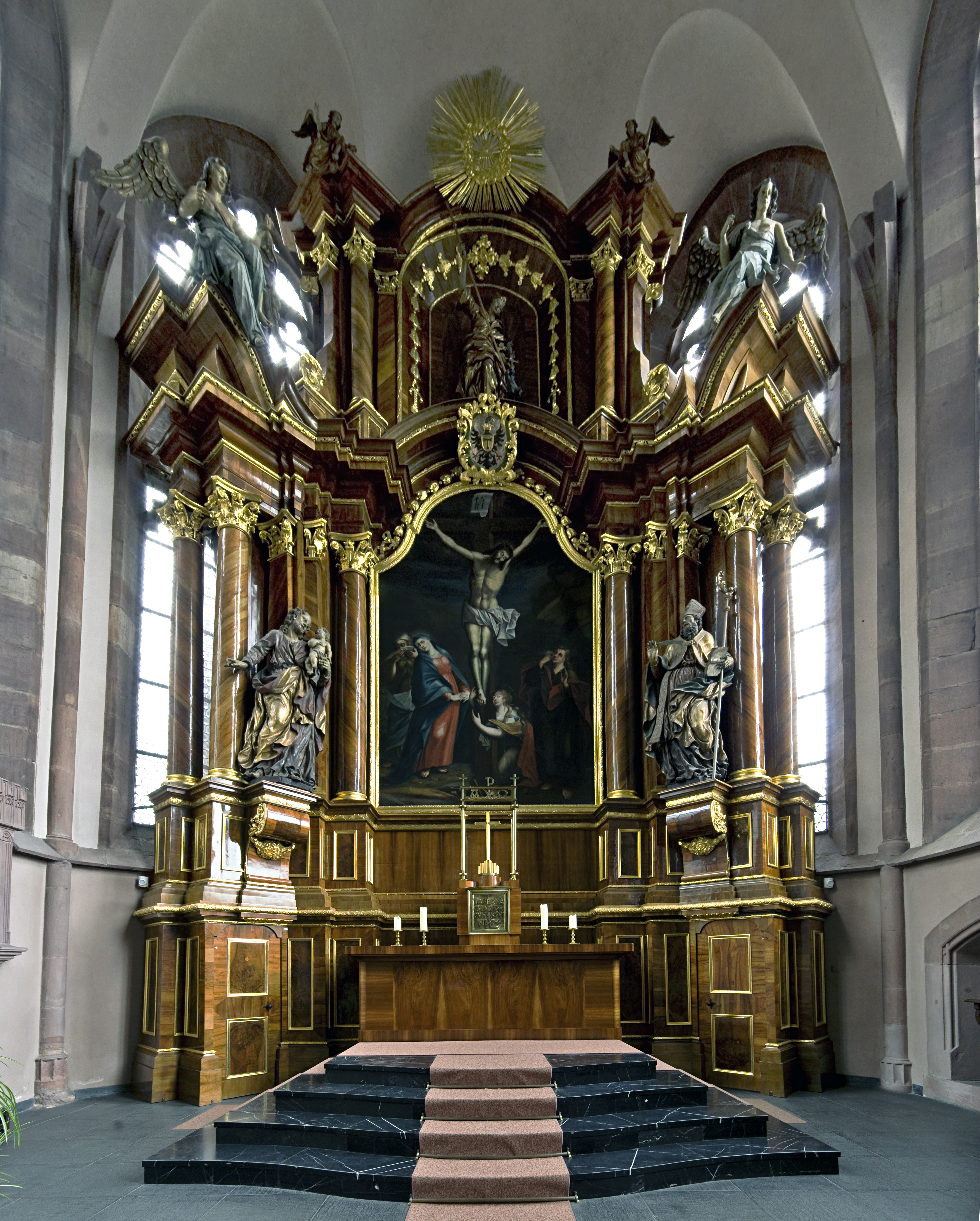 Barocker Hochaltar der Justinuskirche in Frankfurt-Höchst